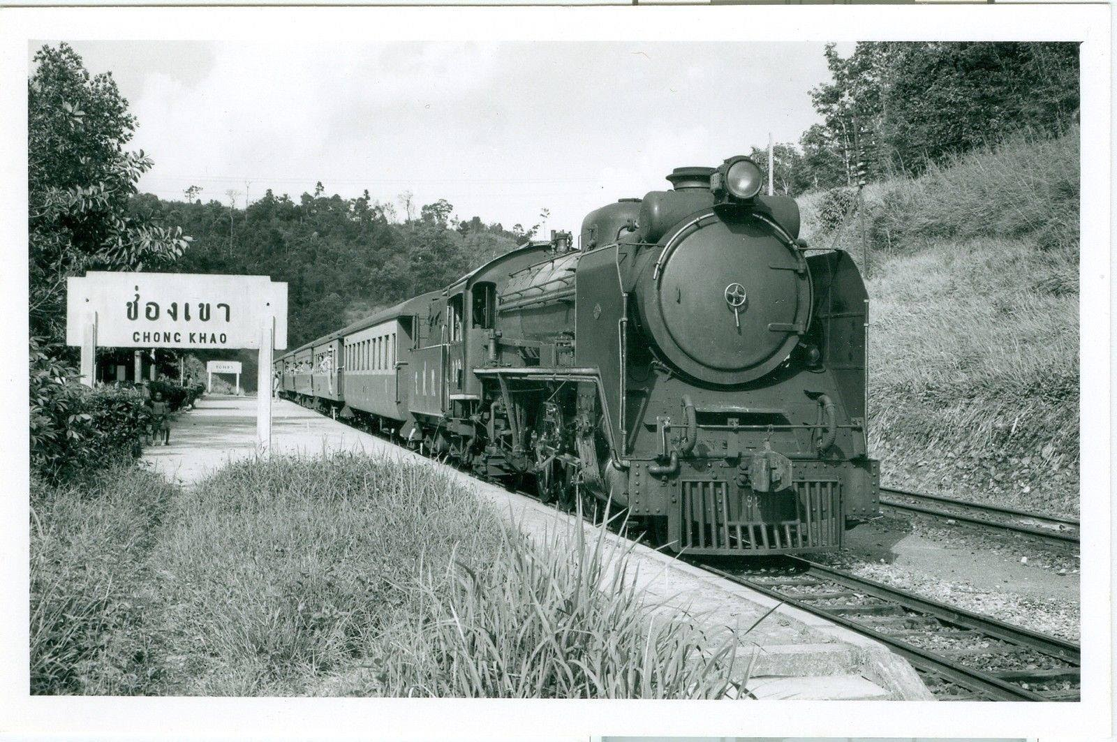 รถจักรไอน้ำแปซิฟิกหมายเลข 828 ขณะทำขบวนรถเร็วที่สถานีรถไฟช่องเขา, จังหวัดนครศรีธรรมราช